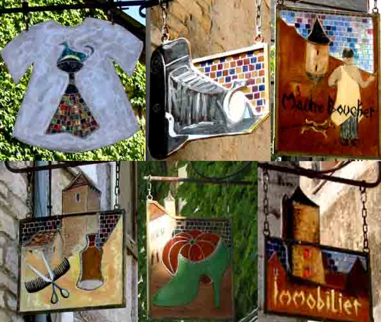 Six des douze enseignes du projet "Enseignes commerciales en site historique" financée sur fond européen, pilotée par la Sauvegarde de Martel © PY Redon Vitrail et fer forgé.